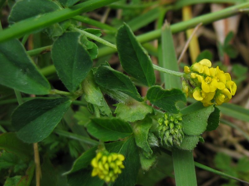 Hopfenklee Medicago lupulina